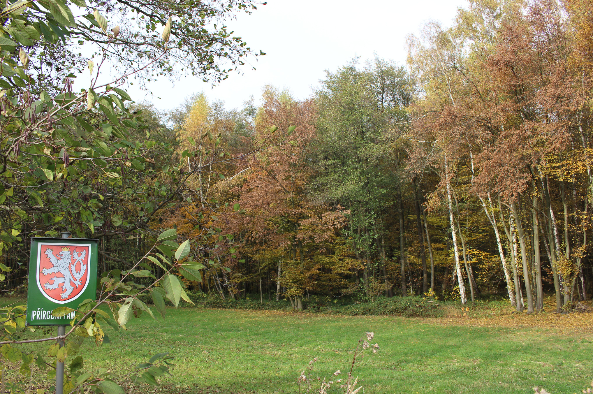 Přírodní památka Babolský háj, ev. č. 1920, okres Blansko